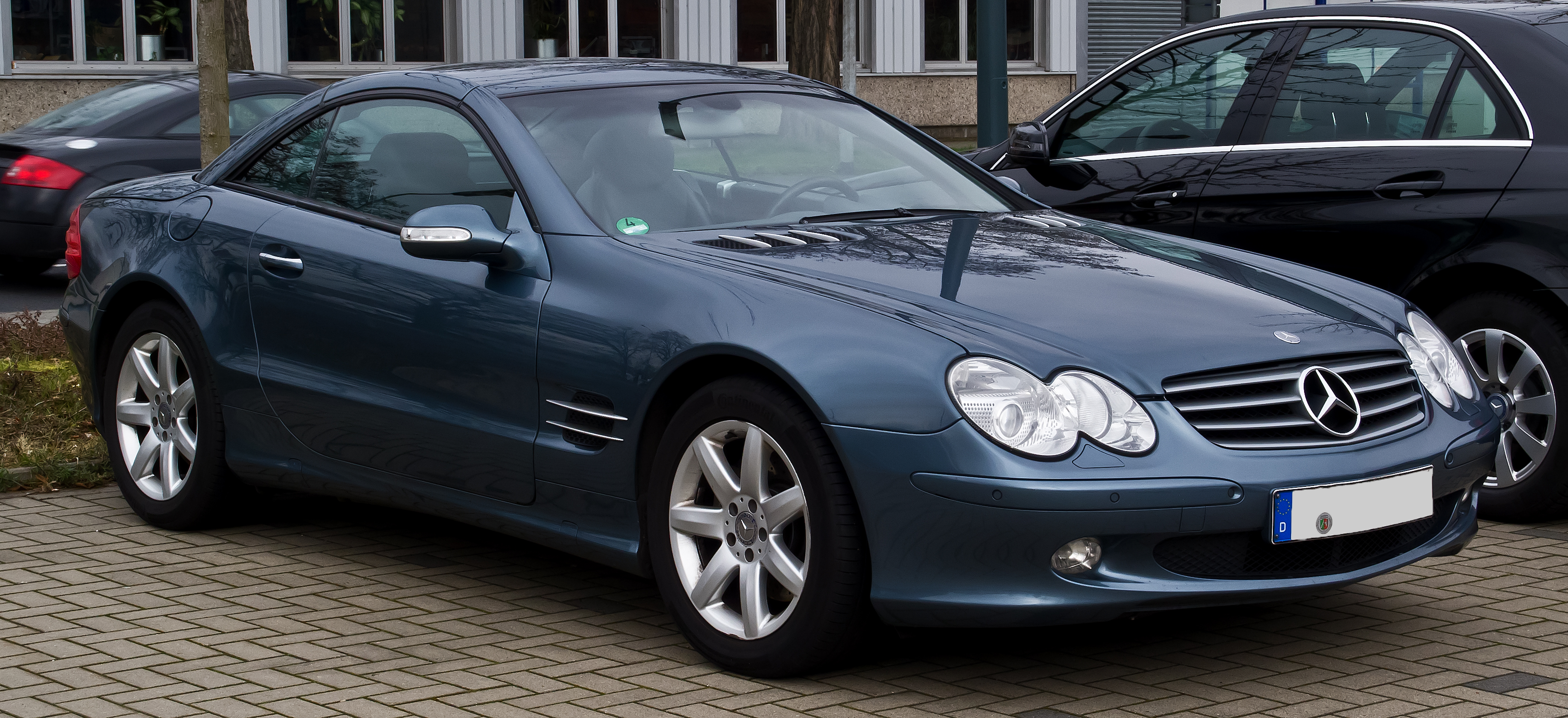 Mercedes-Benz SL 500 (R 230)